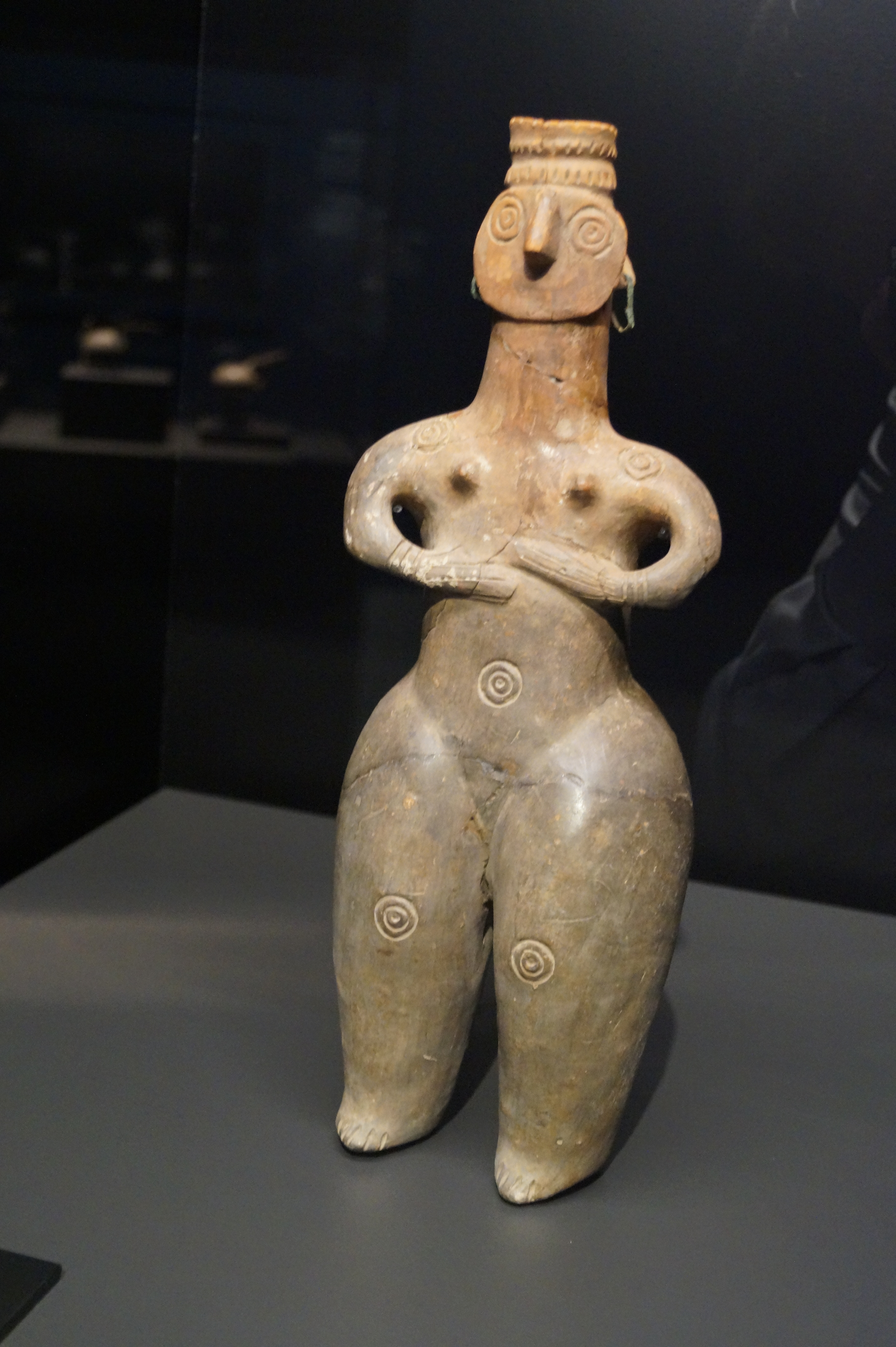 Die Ausstellung "Iran. Frühe Kulturen zwischen Wasser und Wüste" in der Bonner Kunst- und Ausstellungshalle der Bundesrepublik Deutschland zeigte vom 13. April bis 20. August 2017 Kunstgegenstände der iranischen Kulturen der Frühzeit, vom 7. bis ins 1. Jahrtausend v. Chr., und gab einen Einblick in auf eine in Europa wenig bekannte Bildwelt aus einem über Jahrzehnte verschlossenen Land.